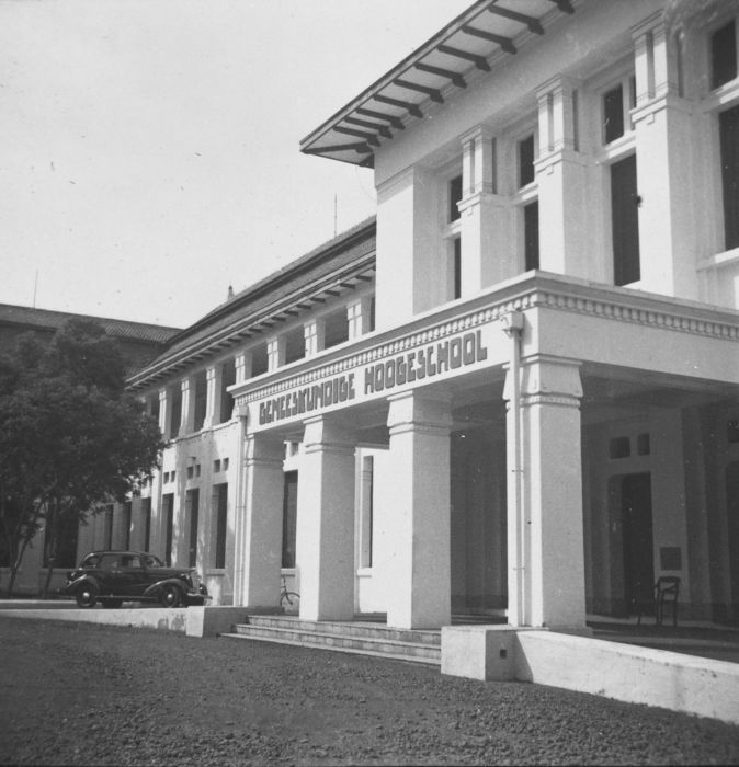 Foto. Het gebouw waarin zich de Geneeskundige Hoogeschool bevindt is het voormalige gebouw van de Stovia. De Geneeskundige Hogeschool in Batavia